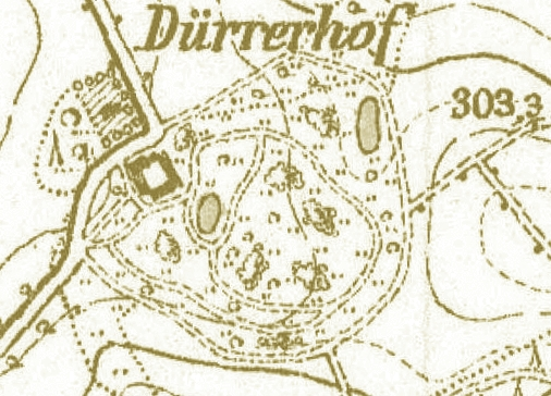 Kartenausschnitt zum Dürrerhof.